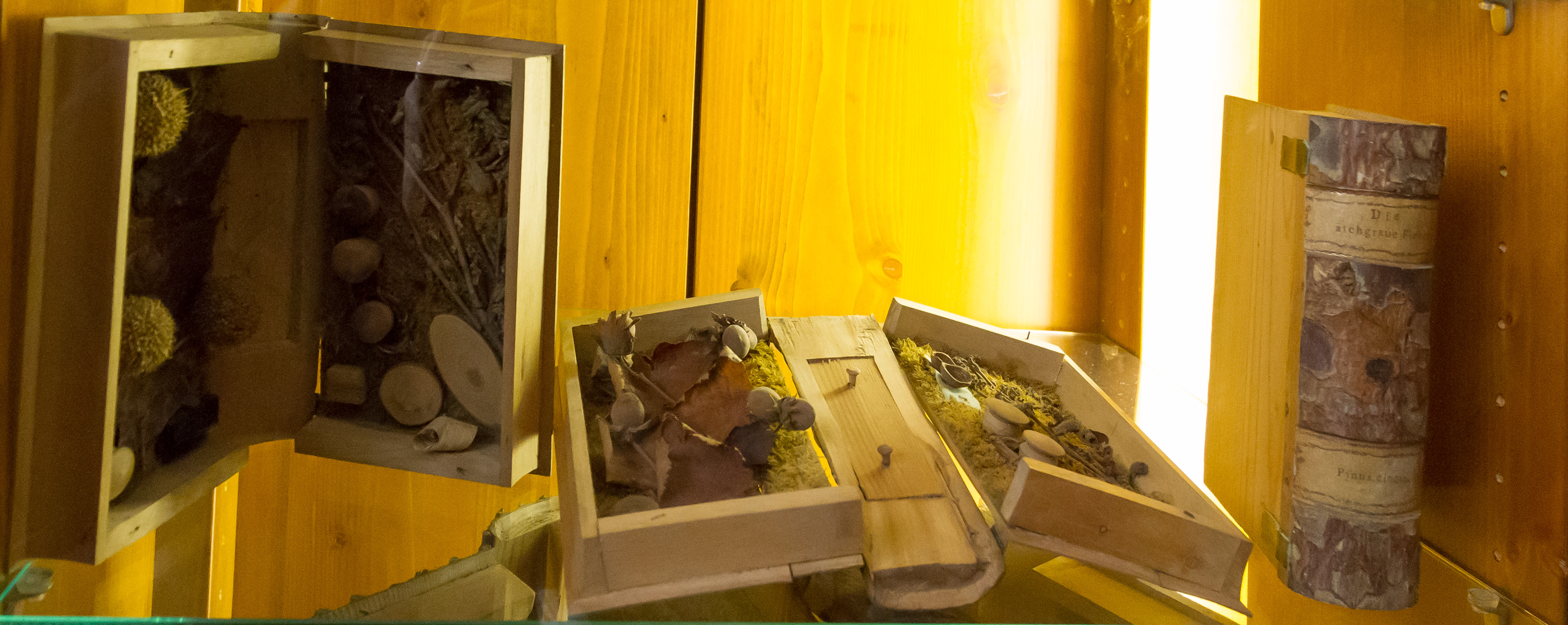 Holzbibliothek auf Schloss Langenburg